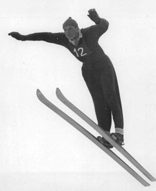 Zentralbild Quasch. 16.2.1953 IV. Wintersportmeisterschaften der Deutschen Demokratischen Republik für Frieden, Einheit, Demokratie und Sozialismus vom 10. - 15.2.1953 in Oberhof Sondersprunglauf auf der Thüringen-Schanze UBz: Zdenek Remsa, CSR, wurde mit der Note 217,5 Dritter.